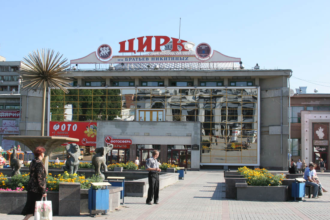 Саратовский цирк имени братьев Никитиных